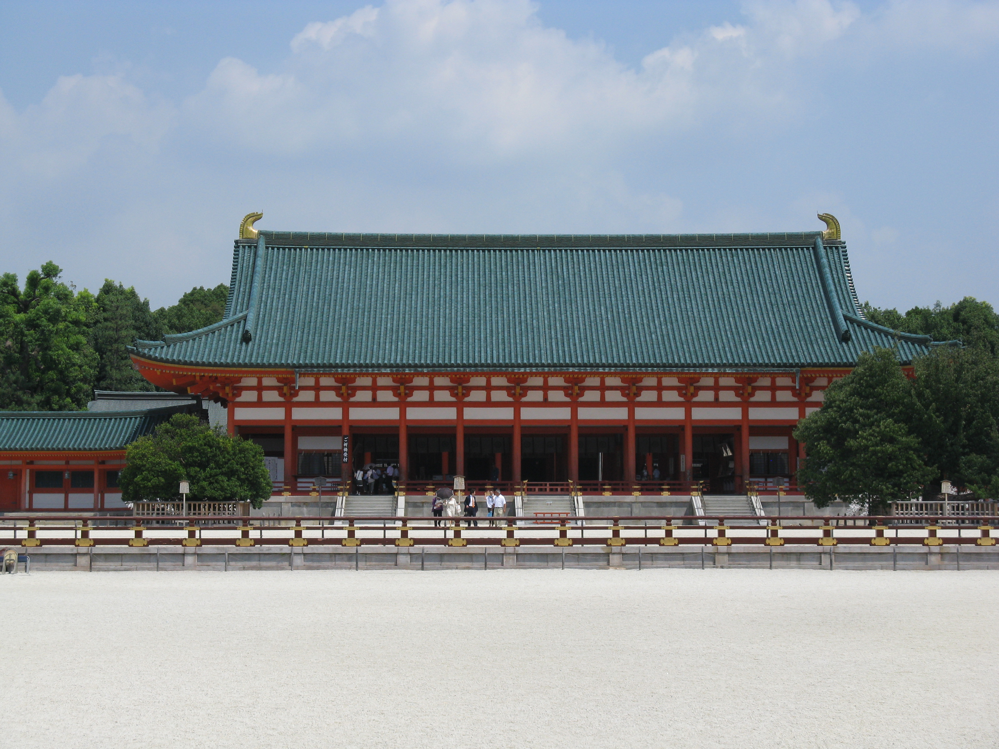 平安神宮 大極殿